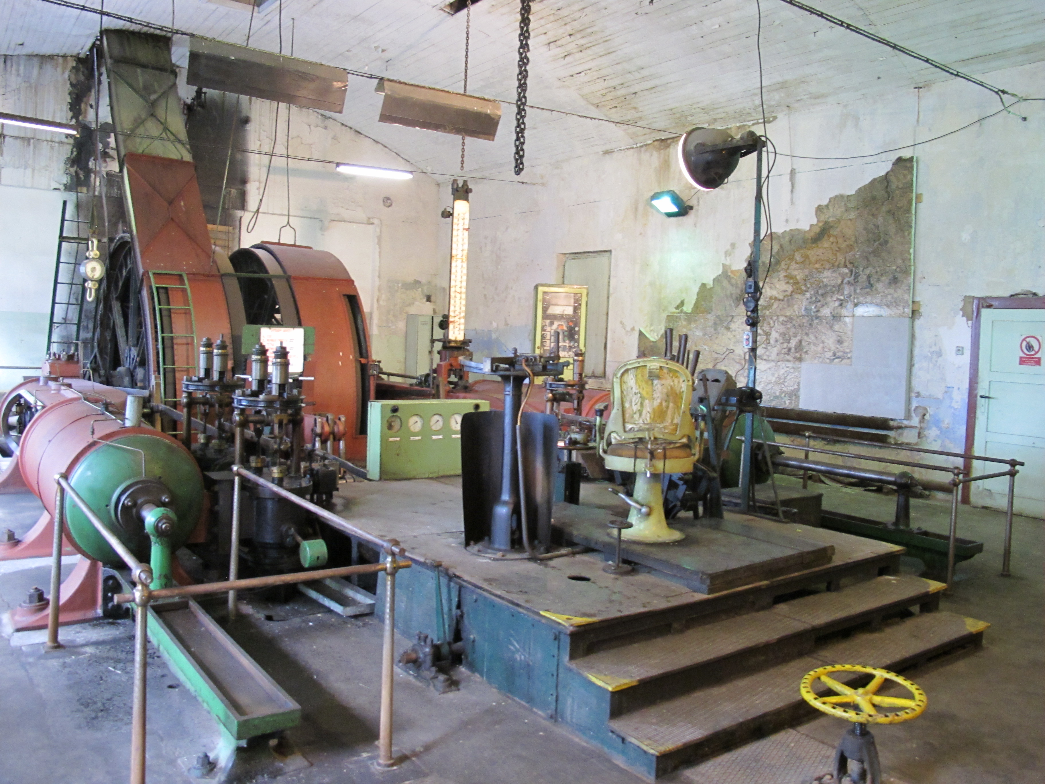 Hlubinný uhelný důl Julius III, dnes Podkrušnohorské technické muzeum - parní těžní stroj